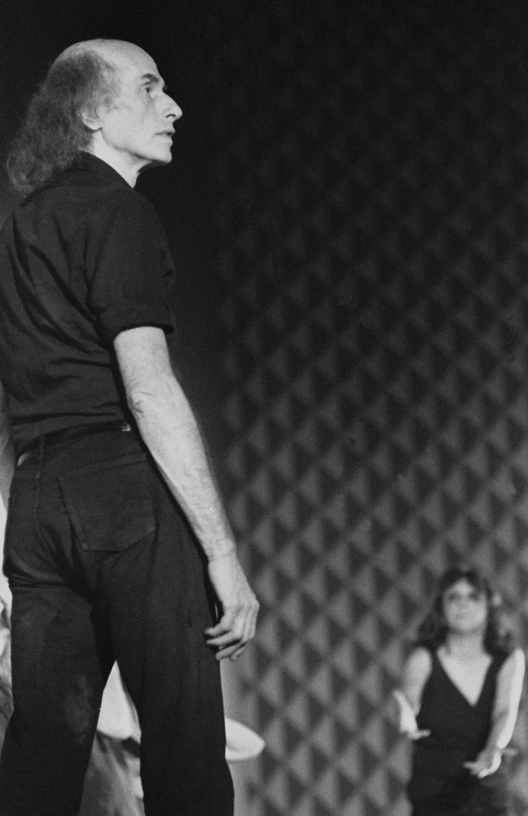 Julian Beck, fondatore del Living Theatre di New York